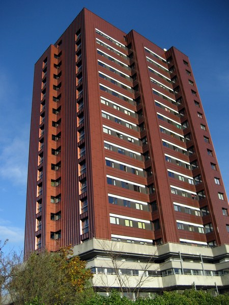 Højhus Langenæs november 2006